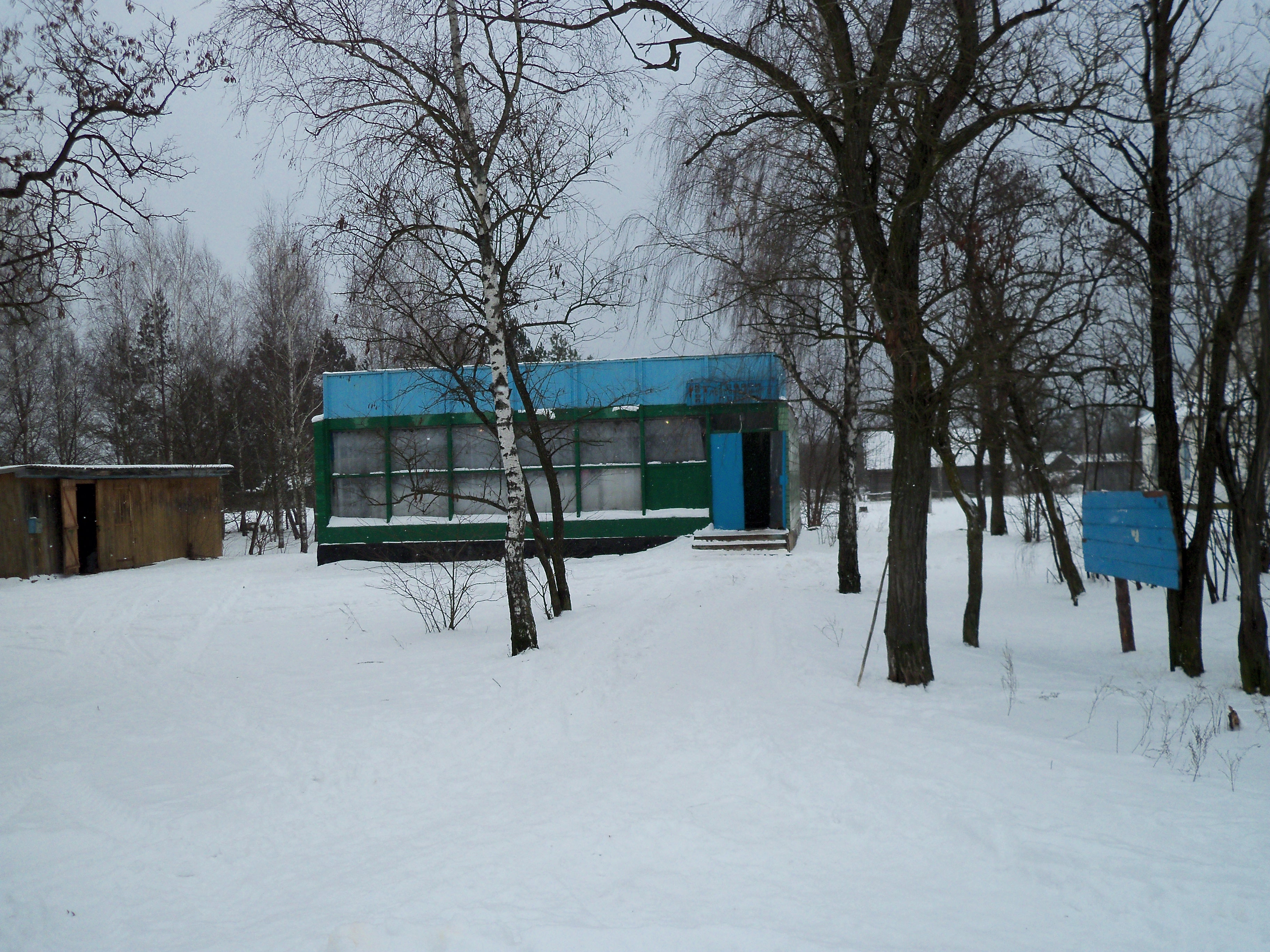 Магазин в с. Возничи, 2011 г.